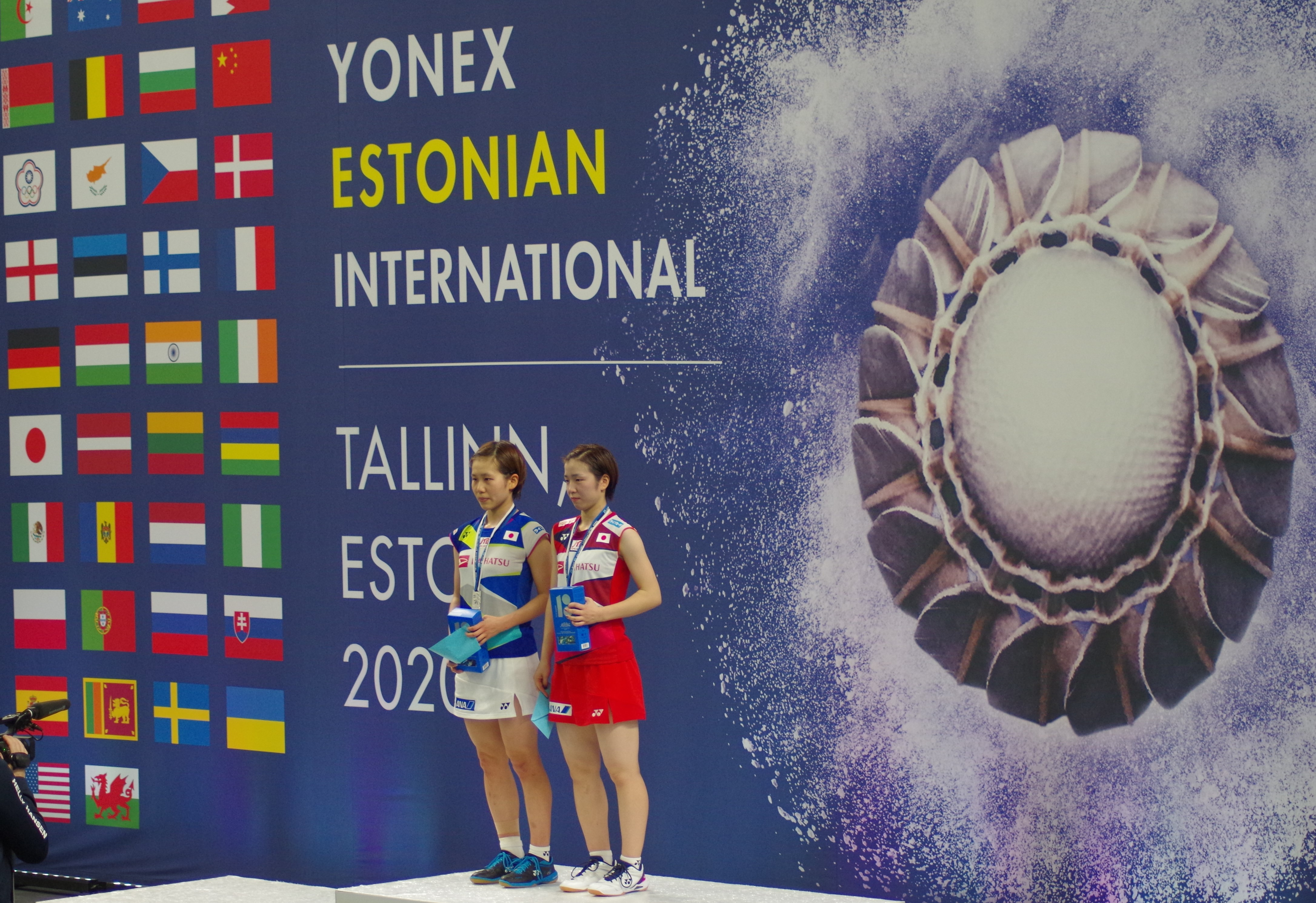 Finalistid Natsuki Nidaira ja Natsuki Oie (vasakul) Tallinnas turniiri YONEX Estonian International 2020 autasustamisel